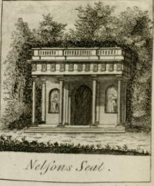 Detail ilustrace z knihy Stowe : a description of the house and gardens of the most noble and puissant prince, George Grenville Nugent Temple, Marquis of Buckingham, Earl Temple, Viscount and Baron Cobham .. (1788)